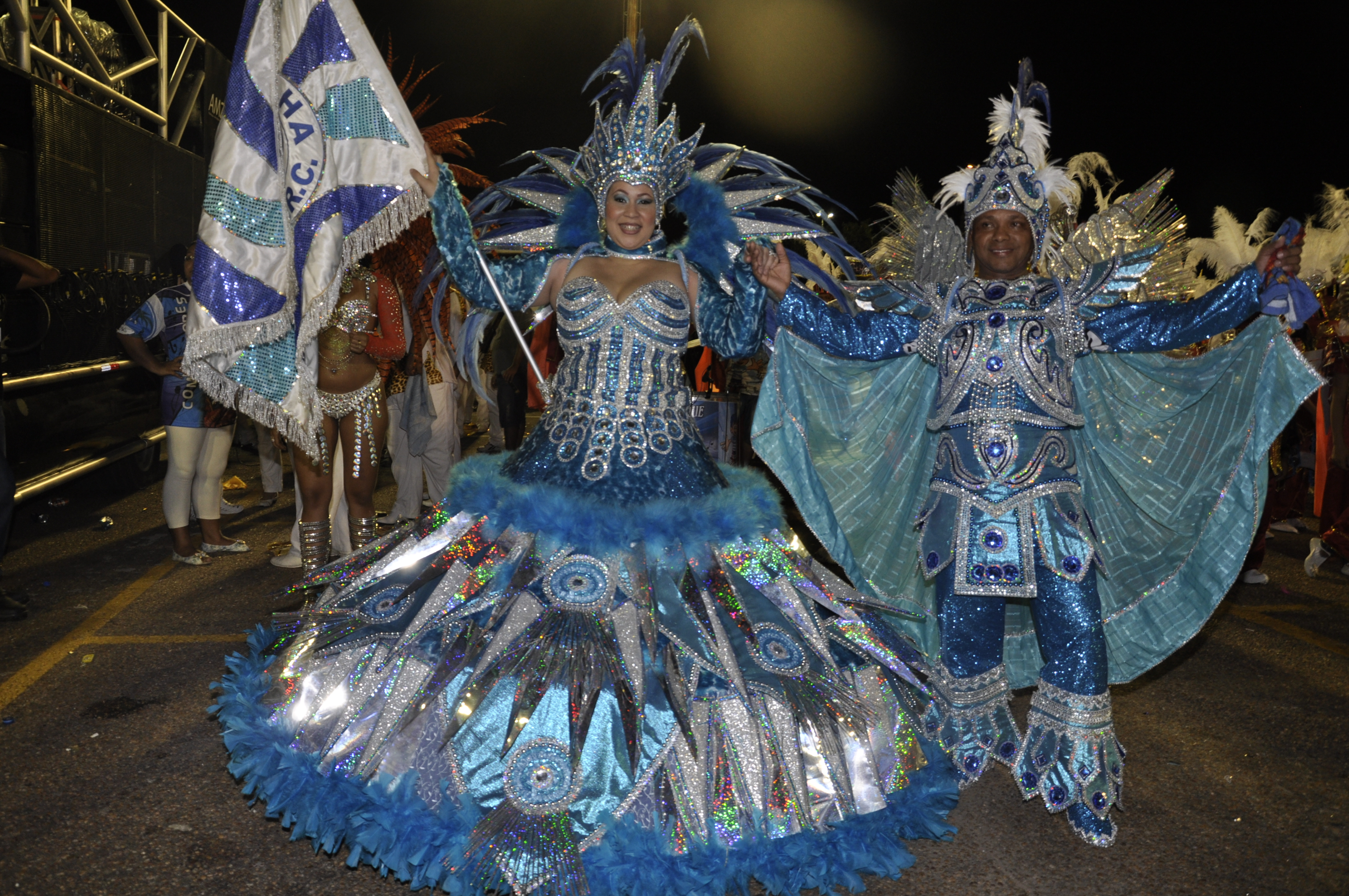 Porta Bandeira e Mestre Sala do G.R.C. Primos da Ilha no desfile de 2015; enredo: Jander Lemos, a mente cria, o desejo atrai e a fé realiza! com que a escola conquistou seu sexto título subindo para o grupo especial.